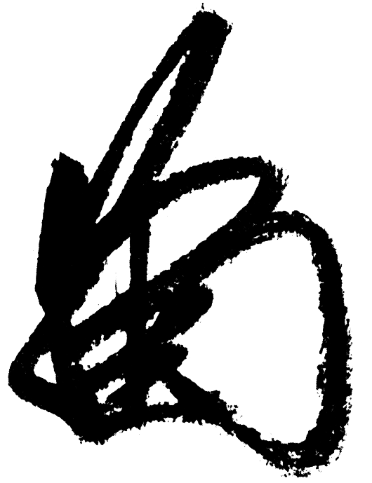 北畠顕能の花押